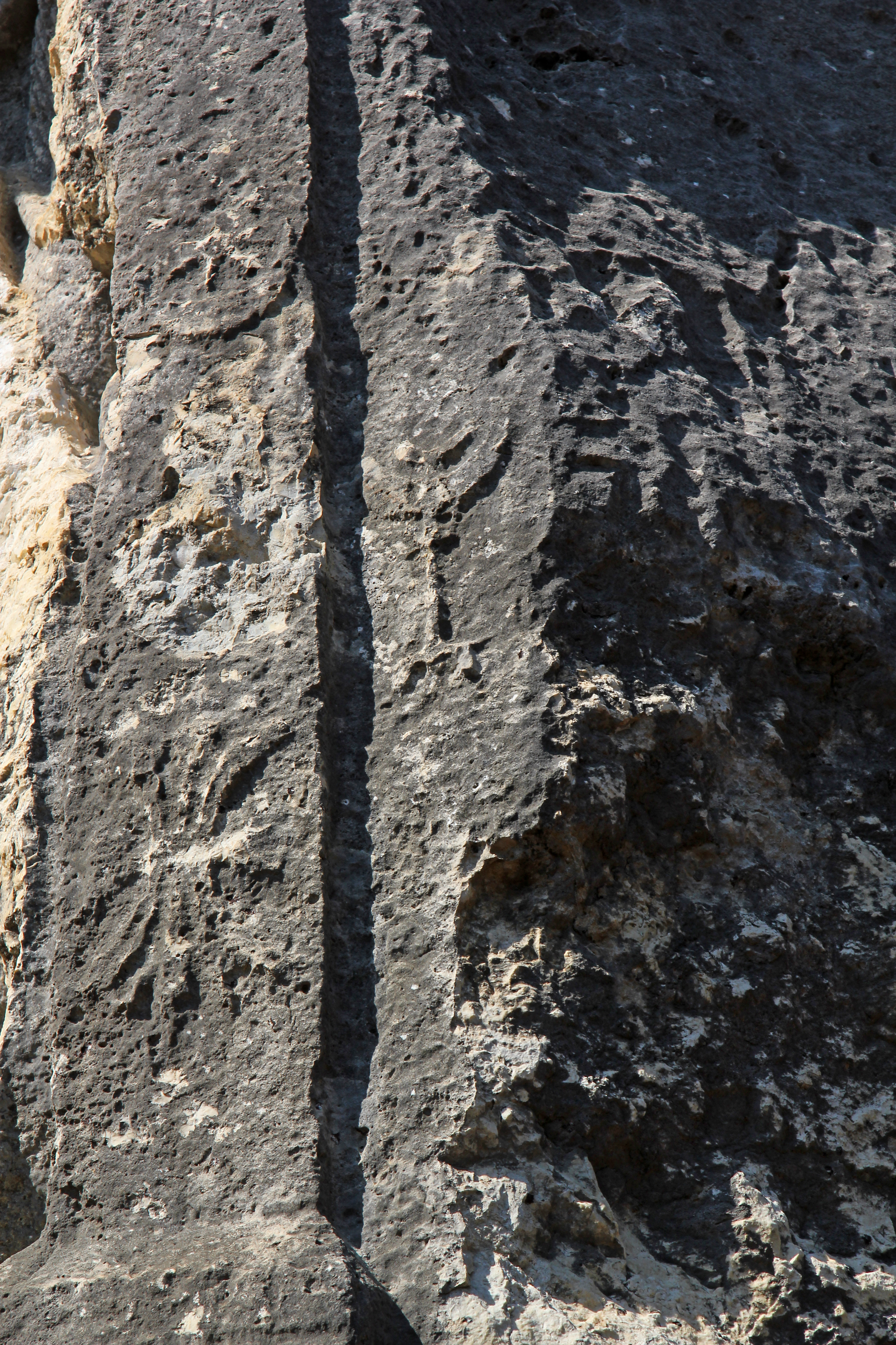 Athena-Relief bei Sömek, Südtürkei, Pilaster mit Symbolen